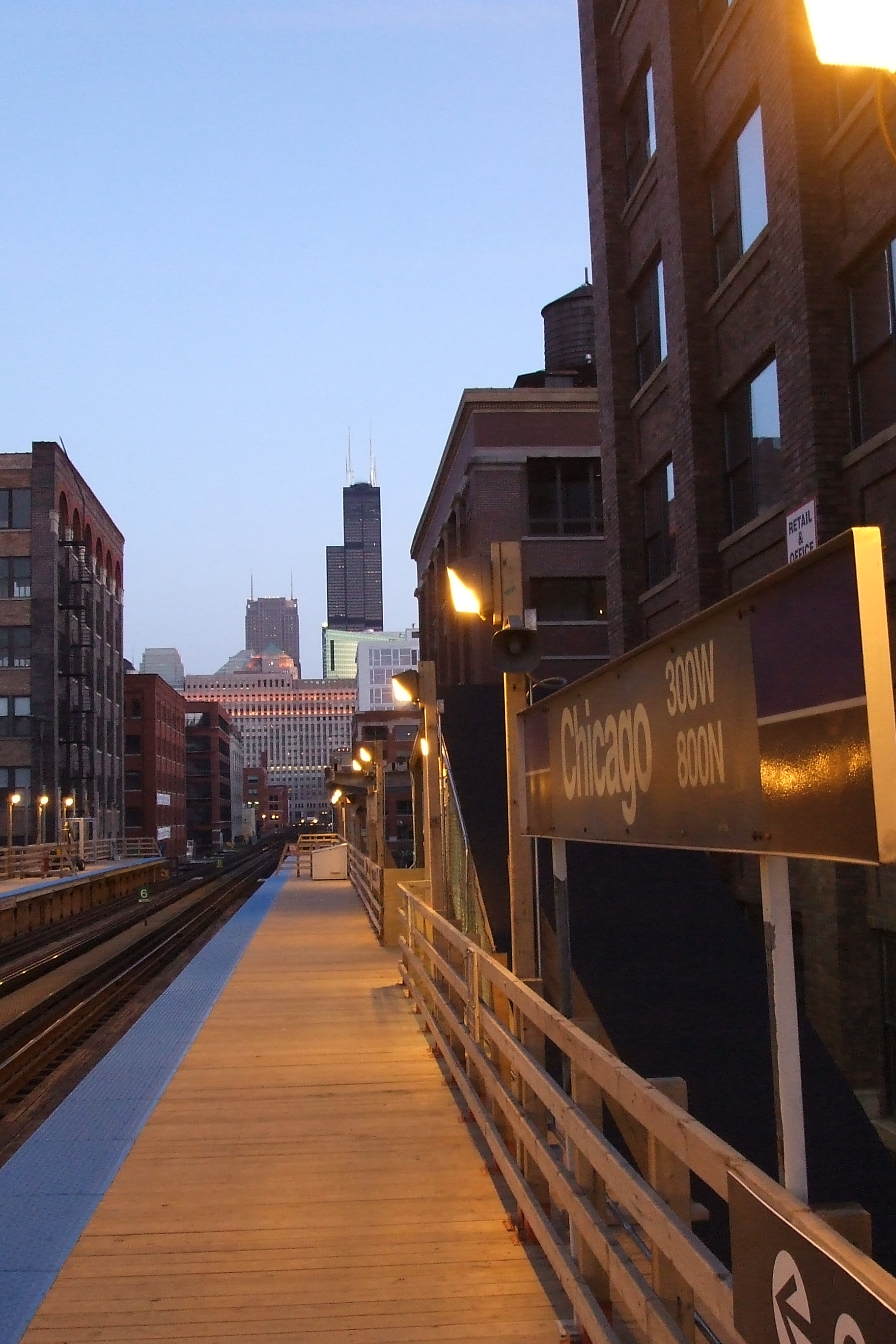 Photo de la station chicago à chicago